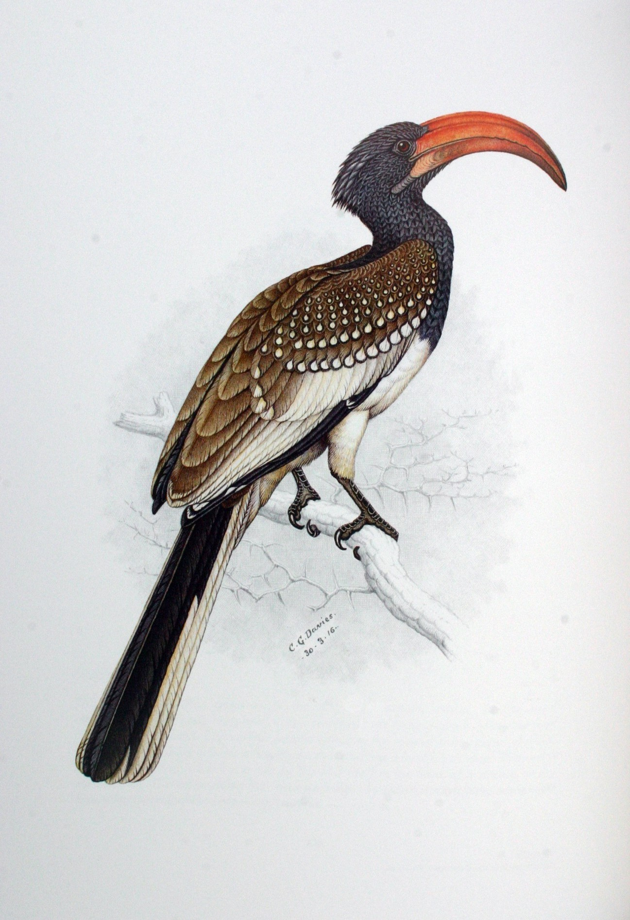 Monteiro's Hornbill (Tockus monteiri) (adult male)